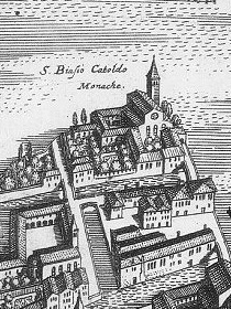 Particolare dalla pianta della città di Venezia di Matthäus Merian il Vecchio (1593-1650) Licensing Categoria:Pianta di Venezia di Jacopo de' Barbari